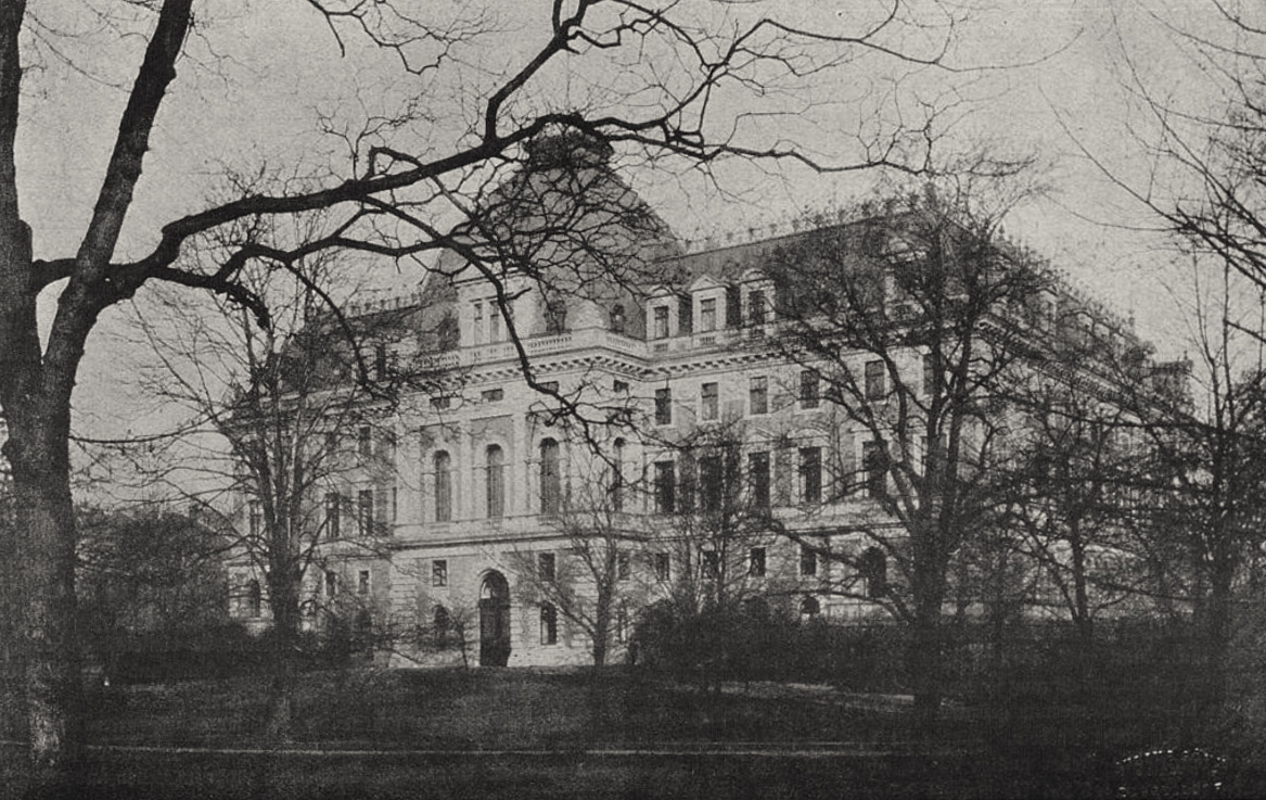 Rückfront des nach dem Entwurf des Architekten Hermann vom Endt umgebauten Provinzial-Ständehauses, Foto Julius Söhn in 1913